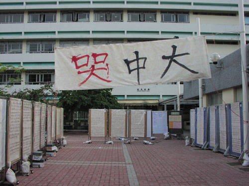 中大學生會哭中大抗議活動。